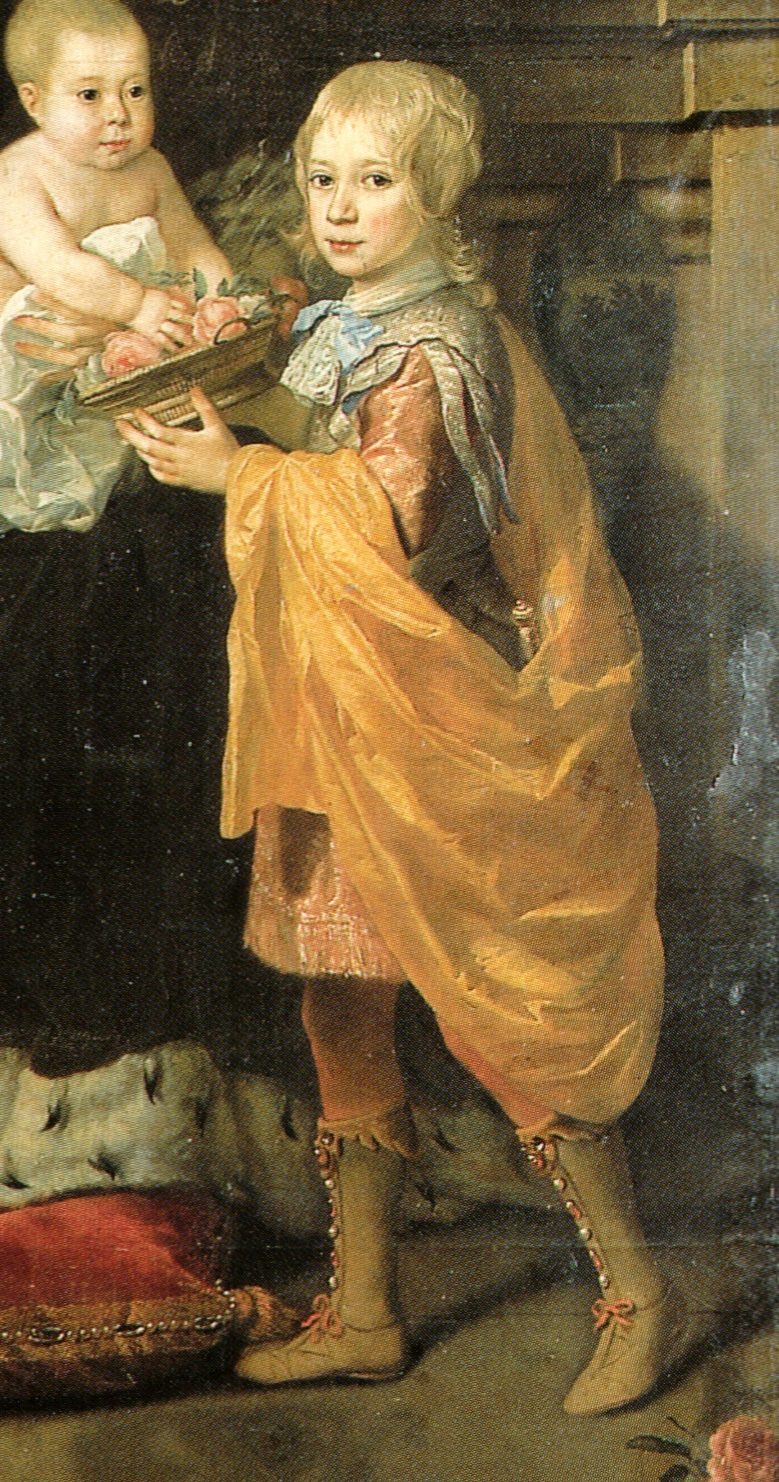 Friedrich III./I. von Branden-Preußen als Kind. Ausschnitt aus einem Familienporträt der Kurfürstlichen Familie von Friedrich Wilhelm.